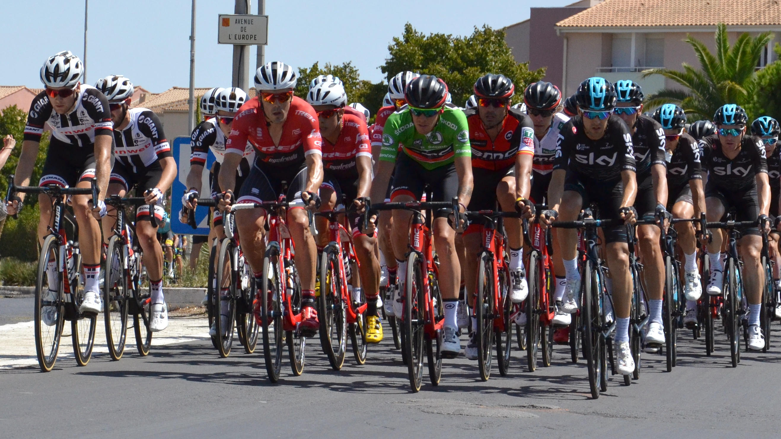 Tour d'Espagne 2017, étape 2 : passage du peloton à Lattes, Hérault, France.